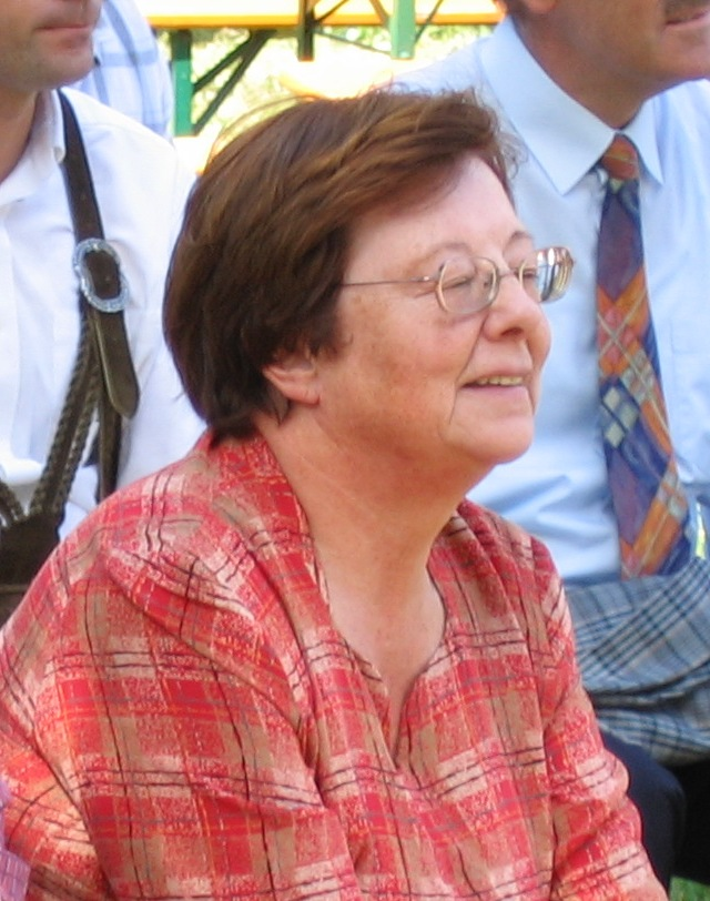 Jezikoslovka in prevajalka